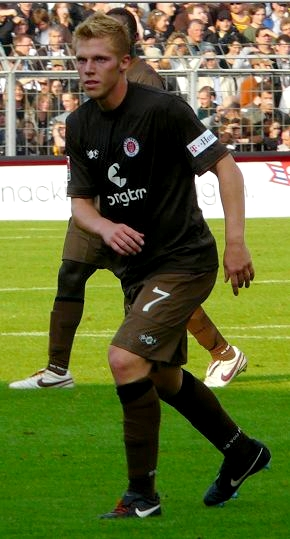 Rouwen Hennings